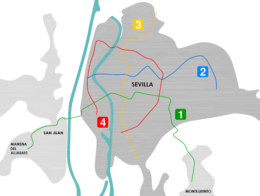 Mpas